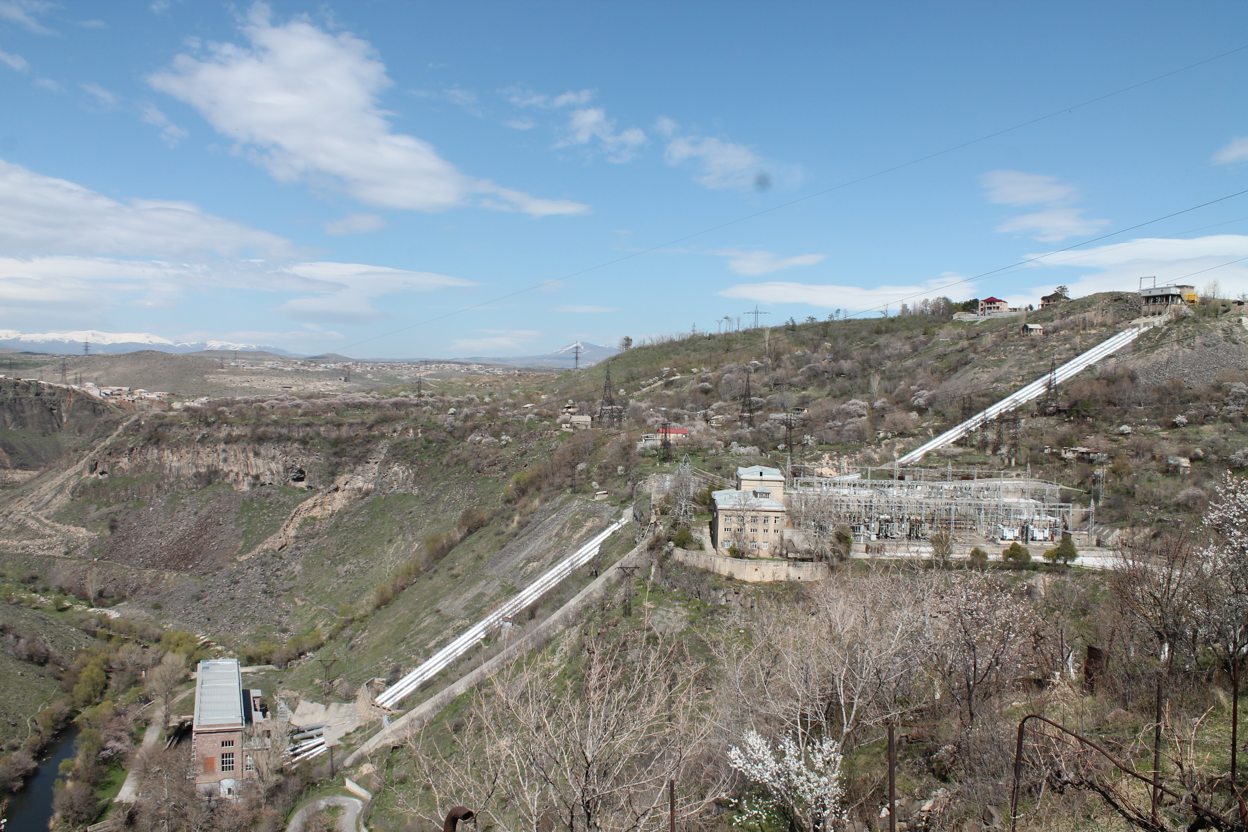 Станционный узел Канакерской ГЭС